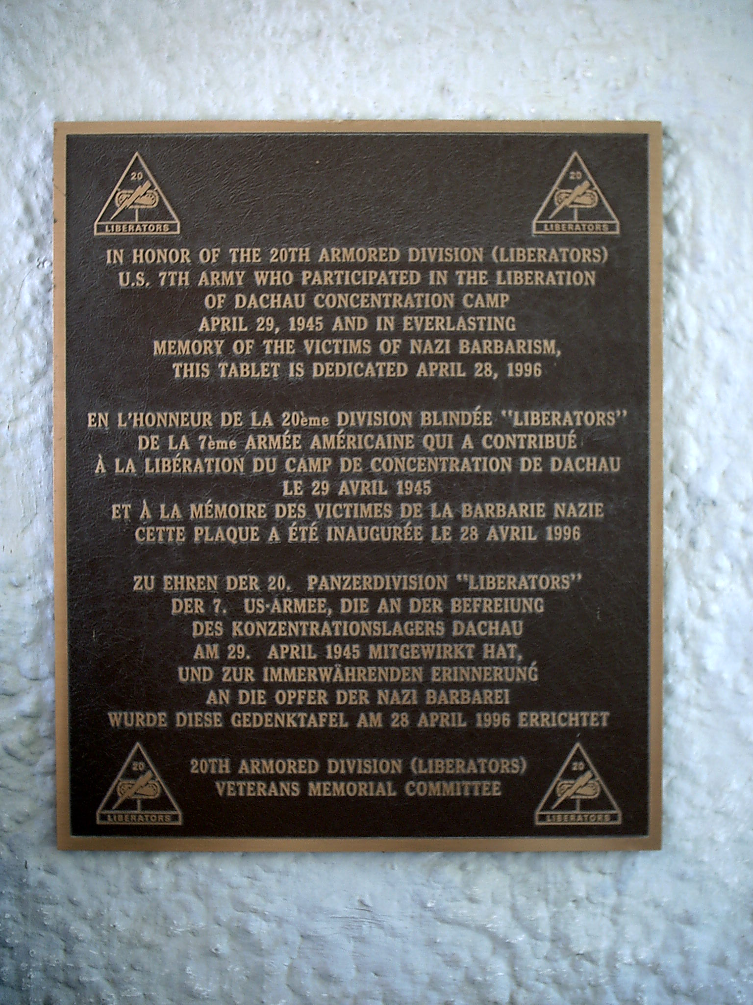 Concentration Camp Dachau, Ehrentafel